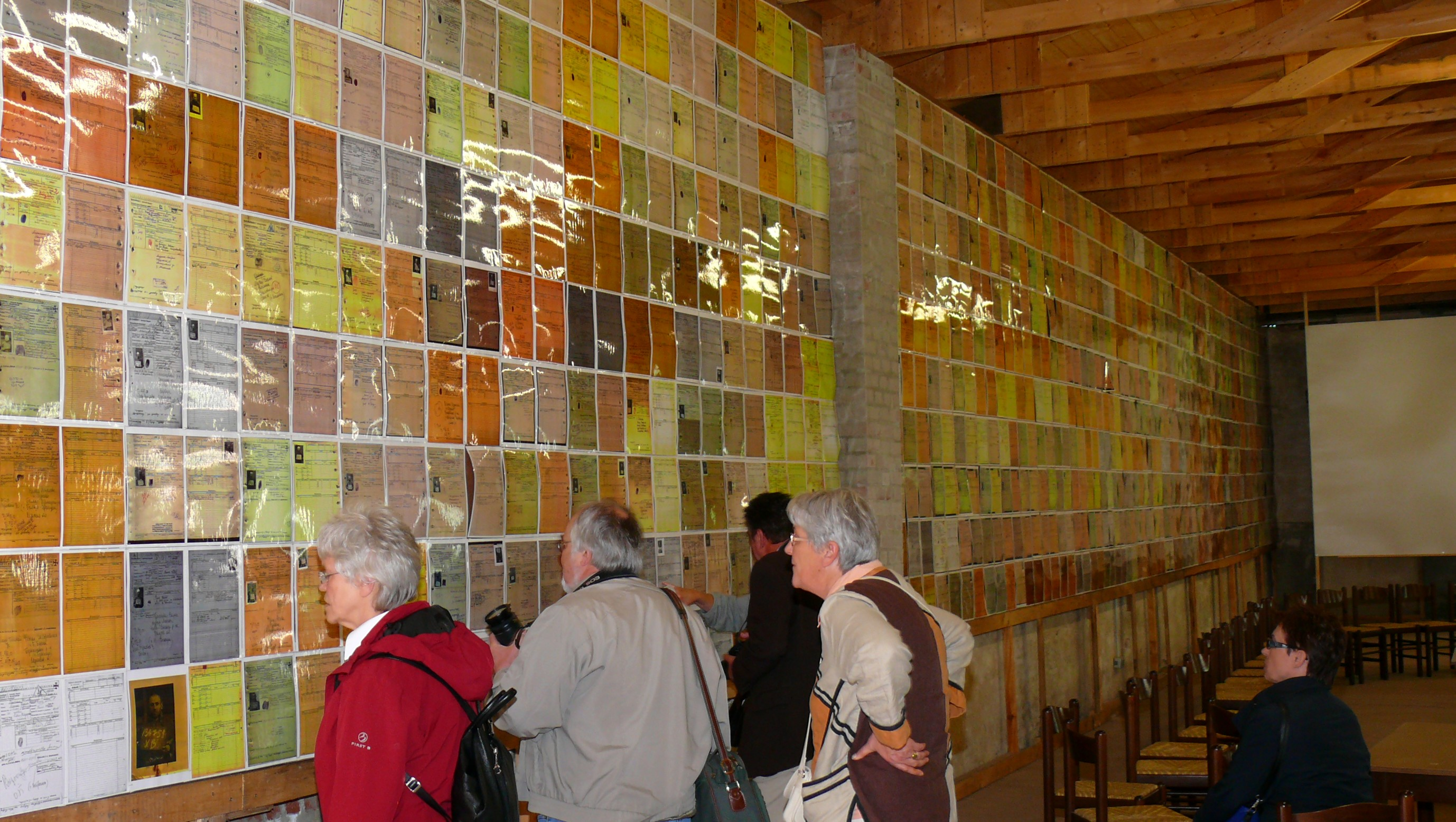 Gedenkstätte Stalag X B Sandbostel / Wand mit Karteikarten von sowjetischen Kriegsgefangenen im "Speisesaal"